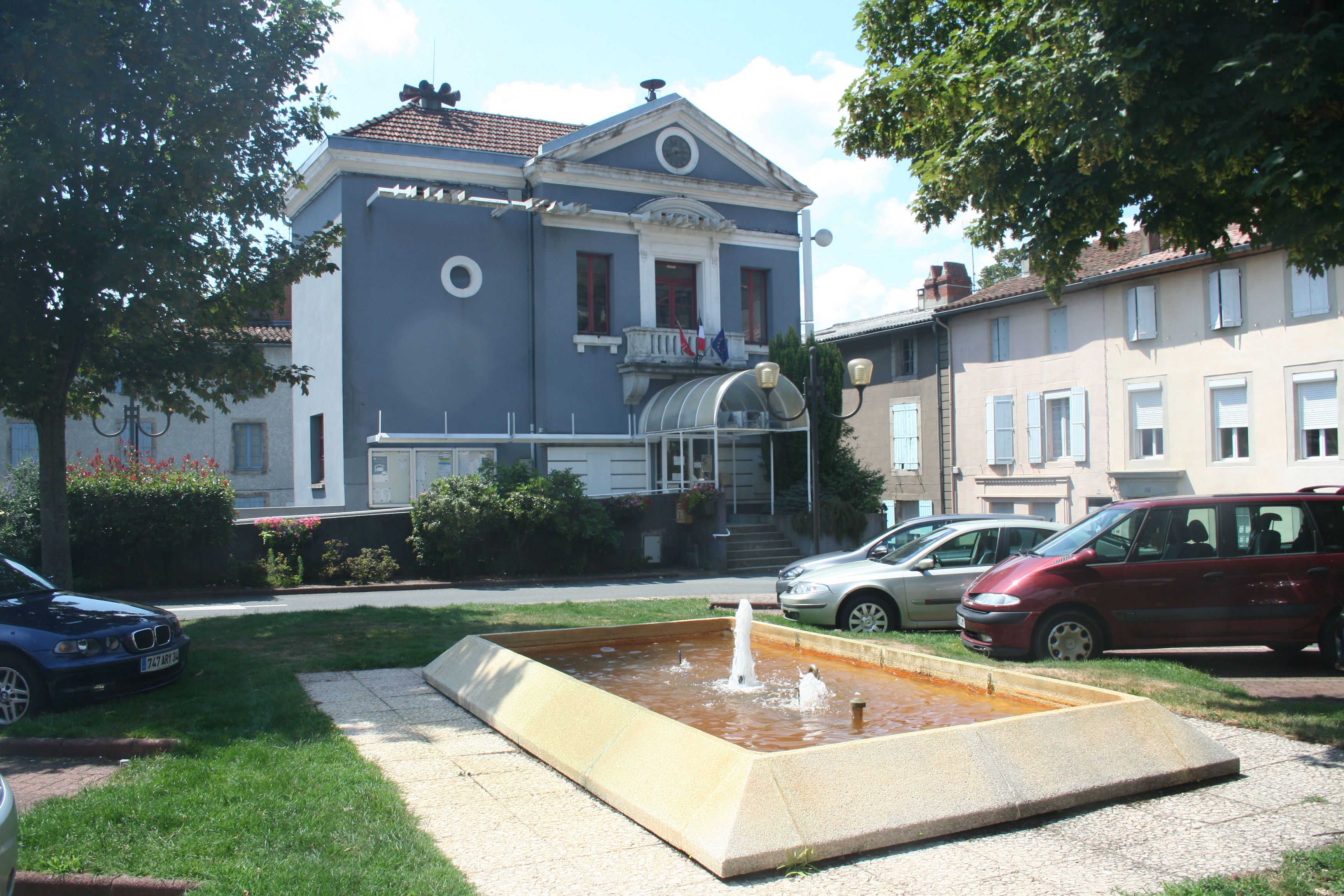 Labastide-Rouairoux (Tarn) - mairie.